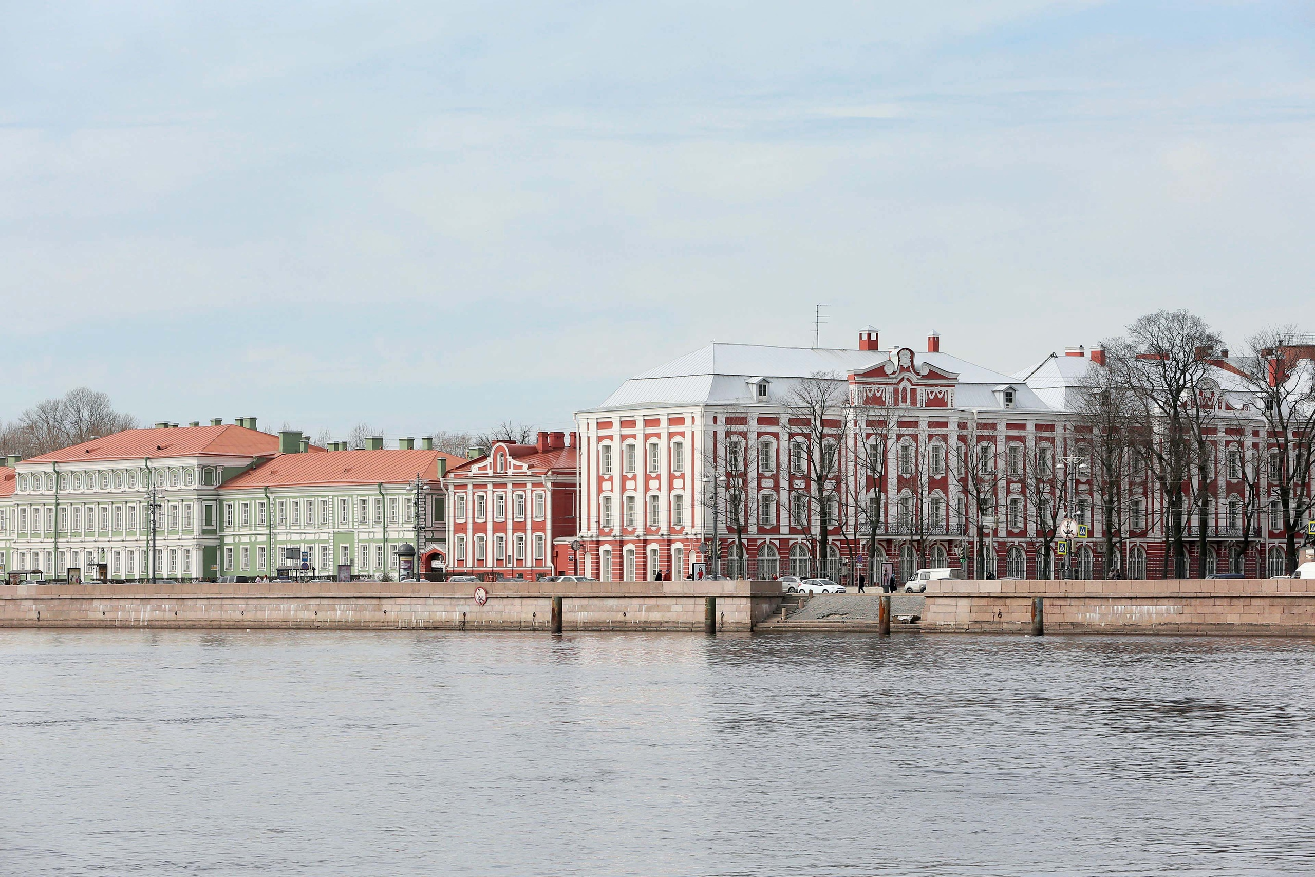 Вид на здание Двенадцати коллегий